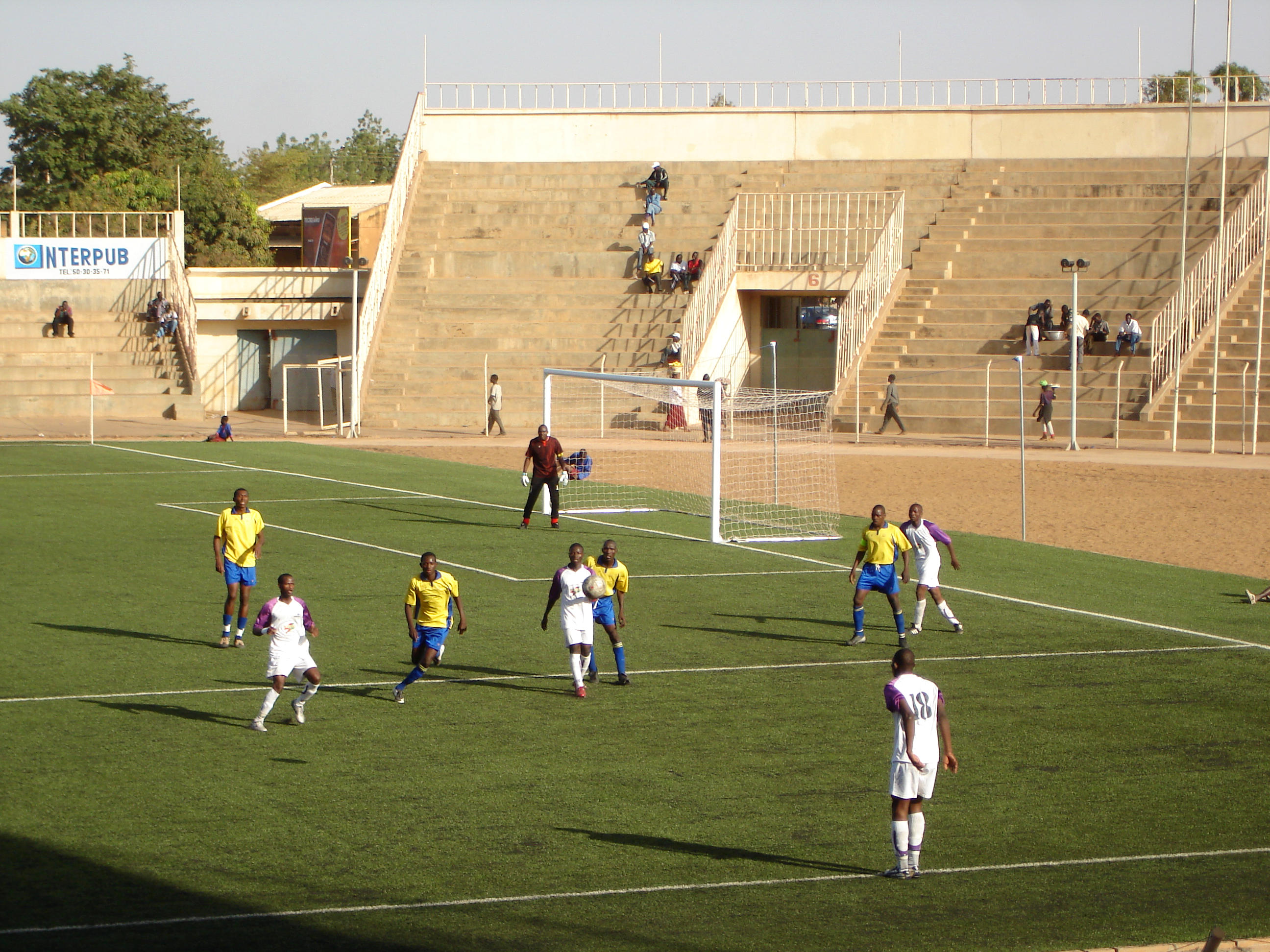 Burkina Faso: Erstligaspiel im Stade municipale von Ouagadougou (CF Ouagadougou – AS-SONABEL Ouagadougou)